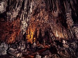 Сталактити